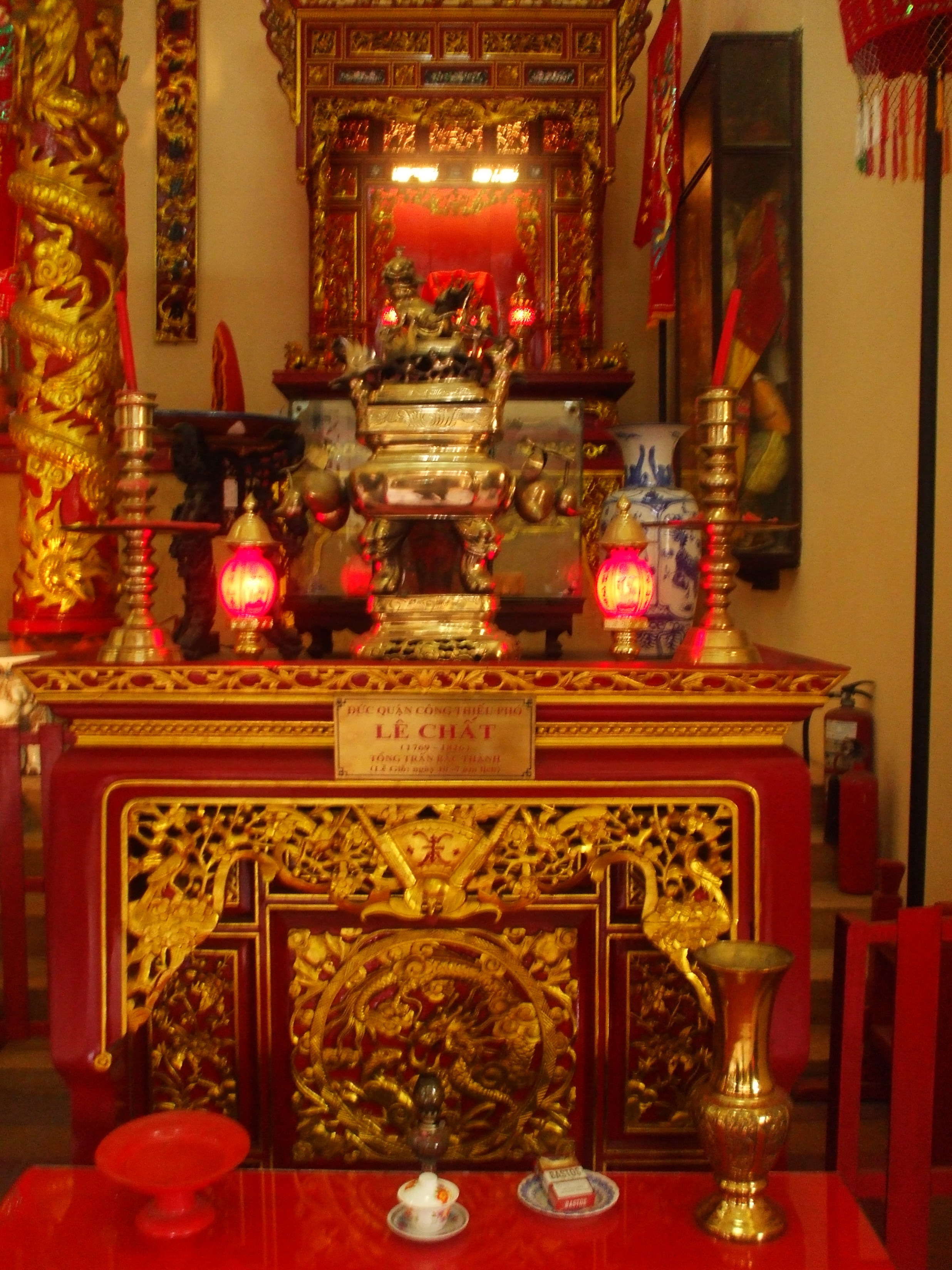 Bàn thờ danh tướng Lê Chất trong Lăng Ông Bà Chiểu (quận Bình Thạnh, Tp. Hồ Chí Minh, Việt Nam)